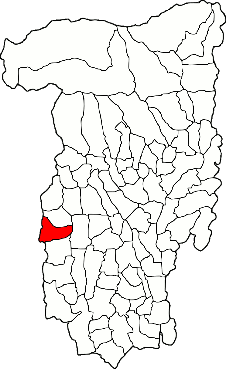 Lage der Gemeinde Grădiștea im Kreis Vâlcea (RO).